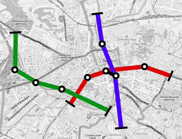 Схема підземних ділянок швидкісного частково підземного трамвая, який планувався і почав будуватися у Львові у 1970-1989-х роках